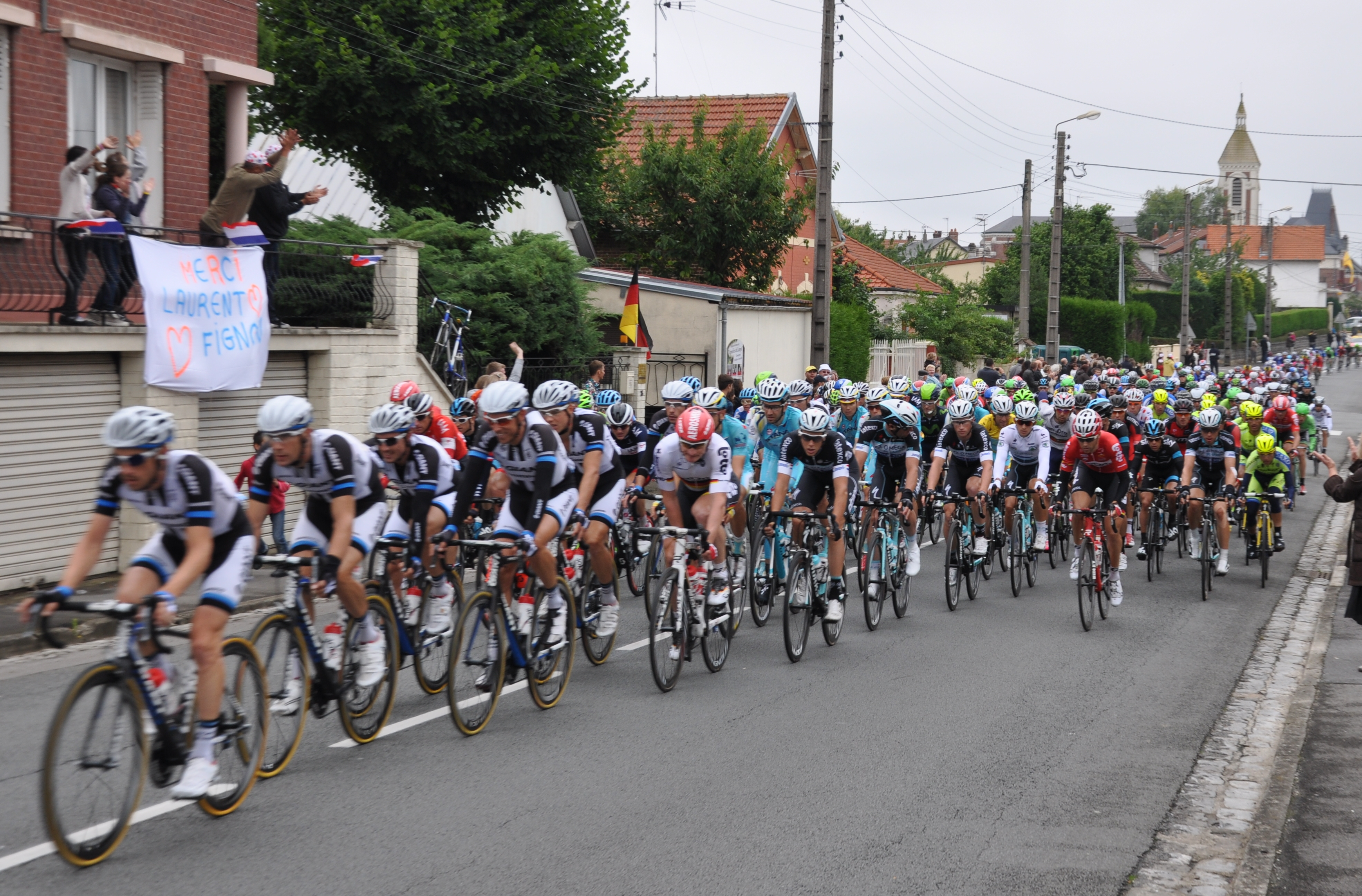 Peleton TDF2014 Etape 6 Tergnier